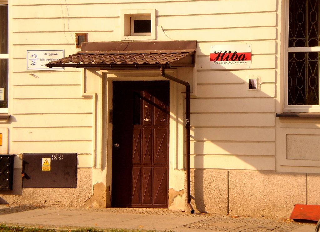 Kamienica w Białymstoku, ul. Zamenhofa 27 - siedziba m.in. wydawnictwa tygodnika Niwa oraz Okręgowej Izby Aptekarskiej.